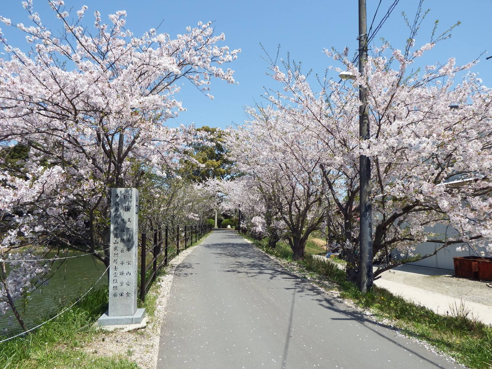 延命寺の進入路は桜のトンネル